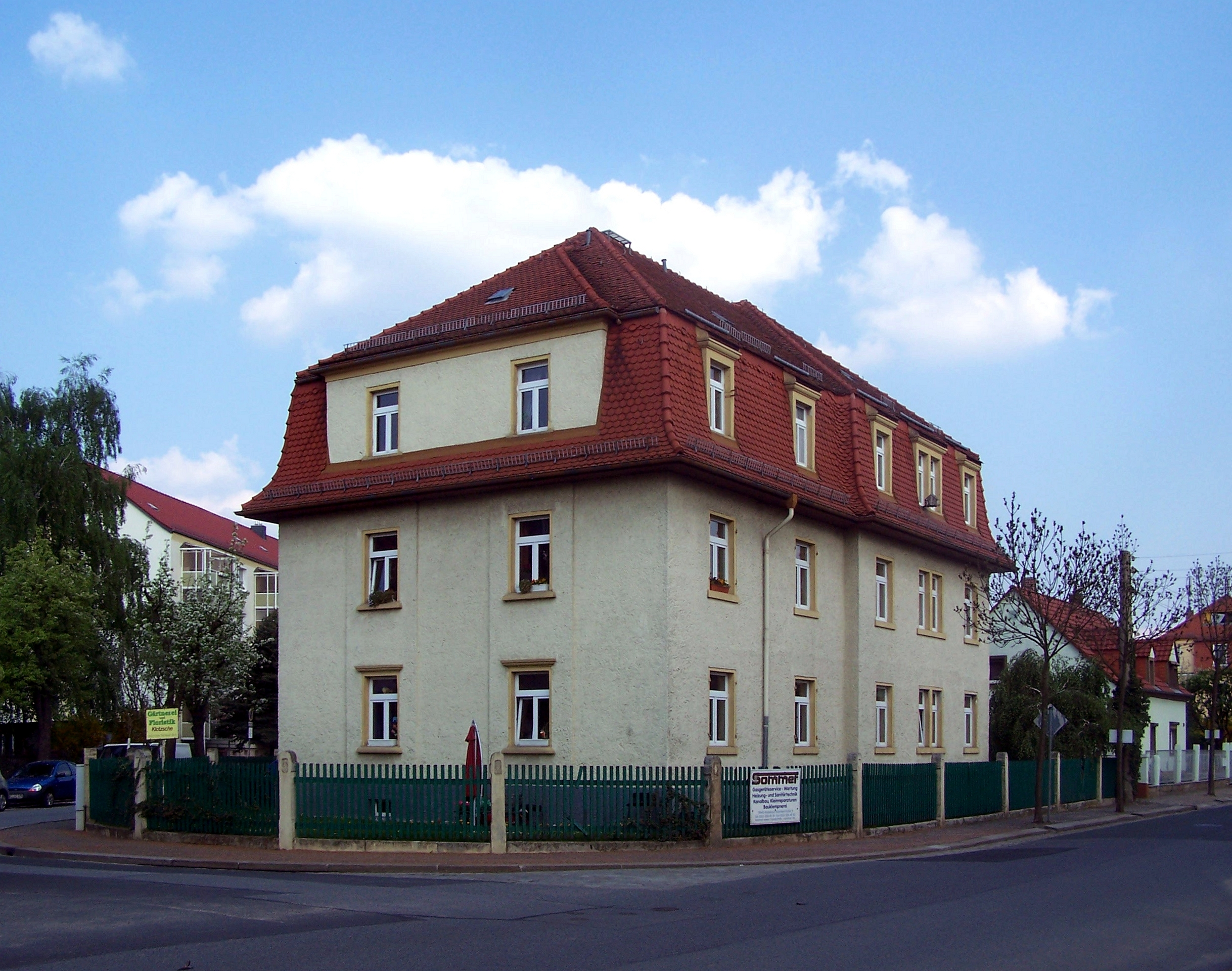 Wohnhaus Trachauer Straße 1, Wohnanlage Ahornstraße, Radebeul